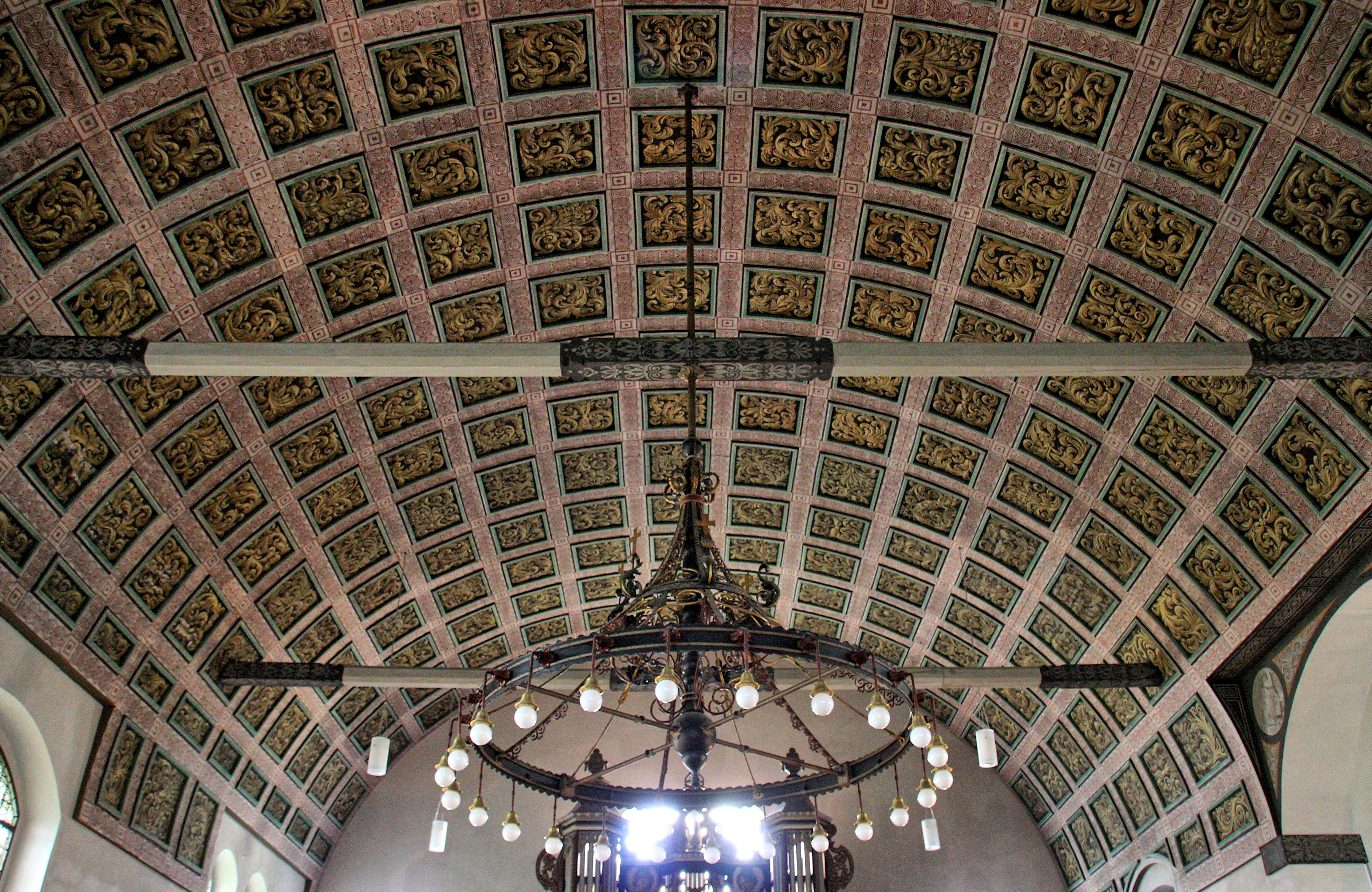 Dorfkirche Hohen Neuendorf Kassettendecke